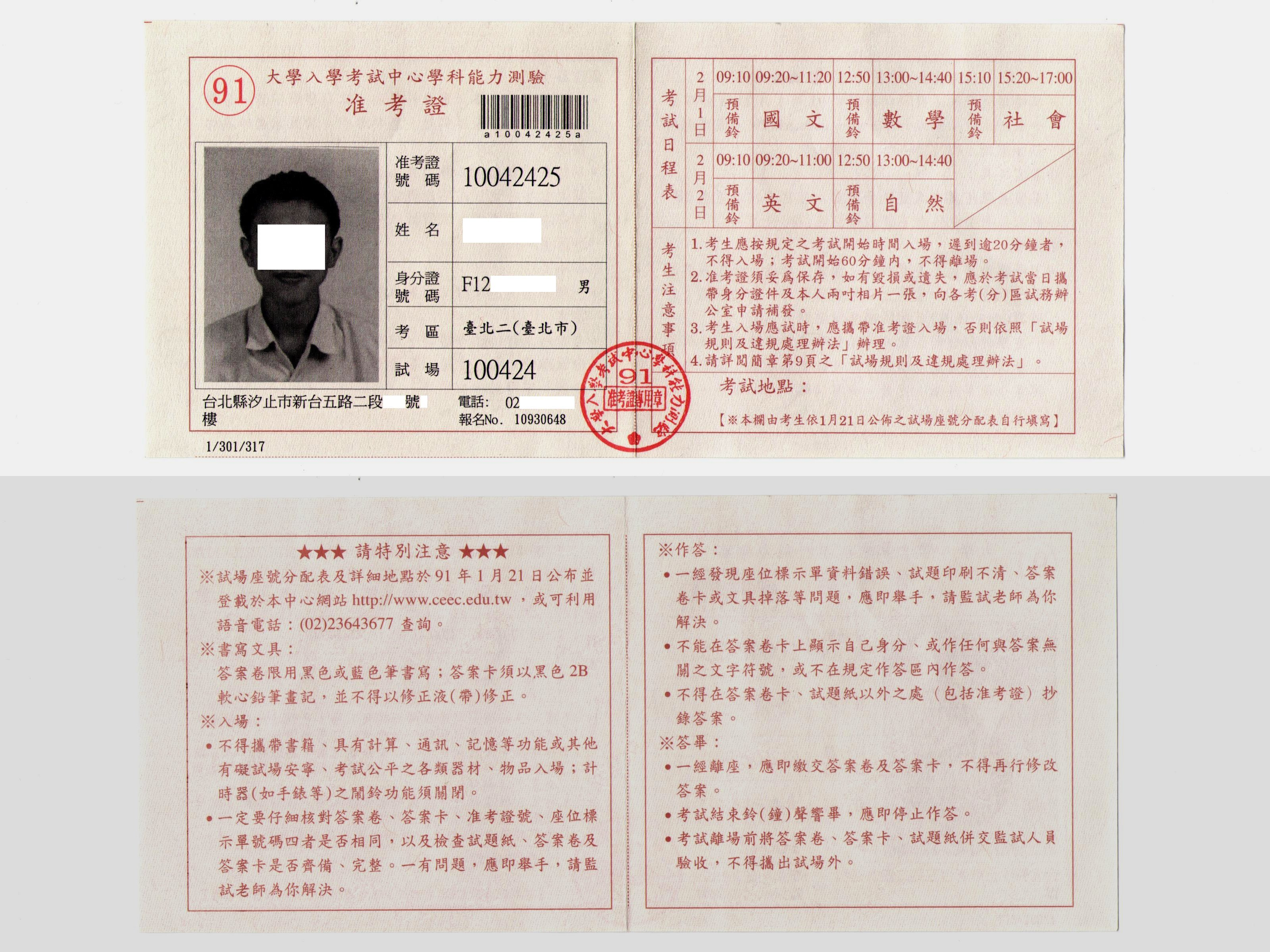 中華民國91學年度大學入學考試中心基金會學科能力測驗准考證。上為正面，下為反面。